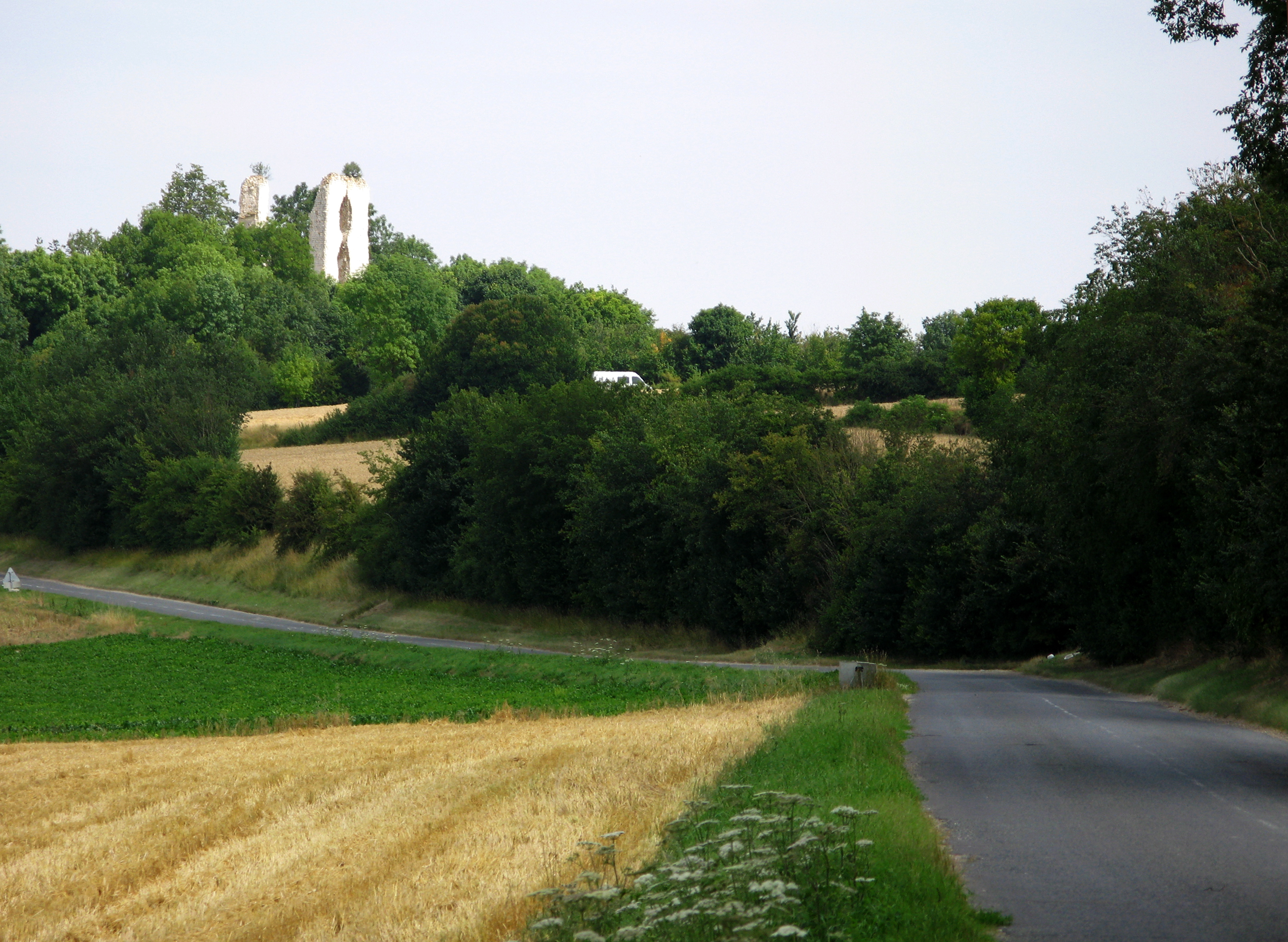 Boves (Somme, France) - Vestiges du château fort aperçus depuis la route. .